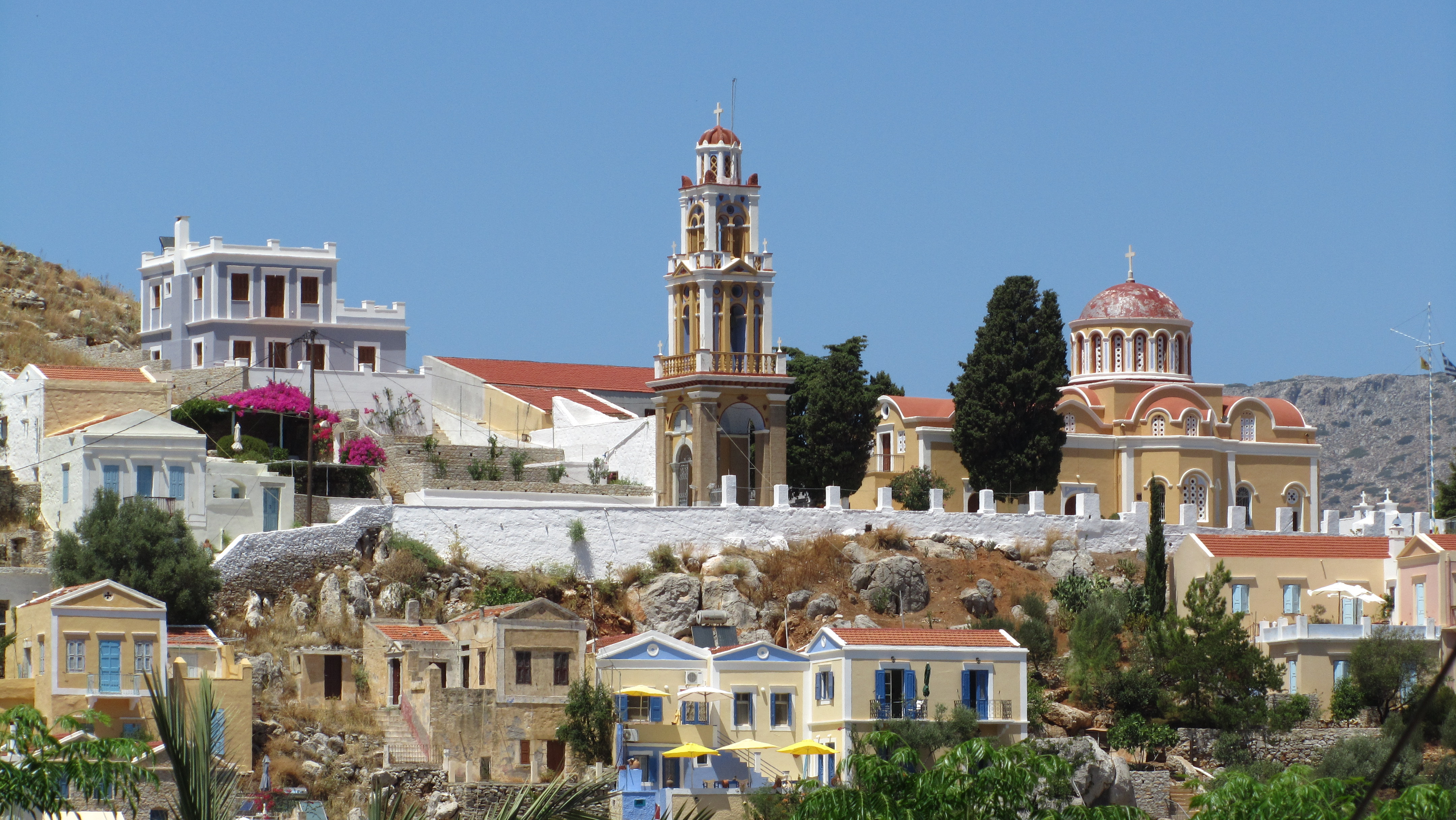 Ano Symi 856 00, Greece